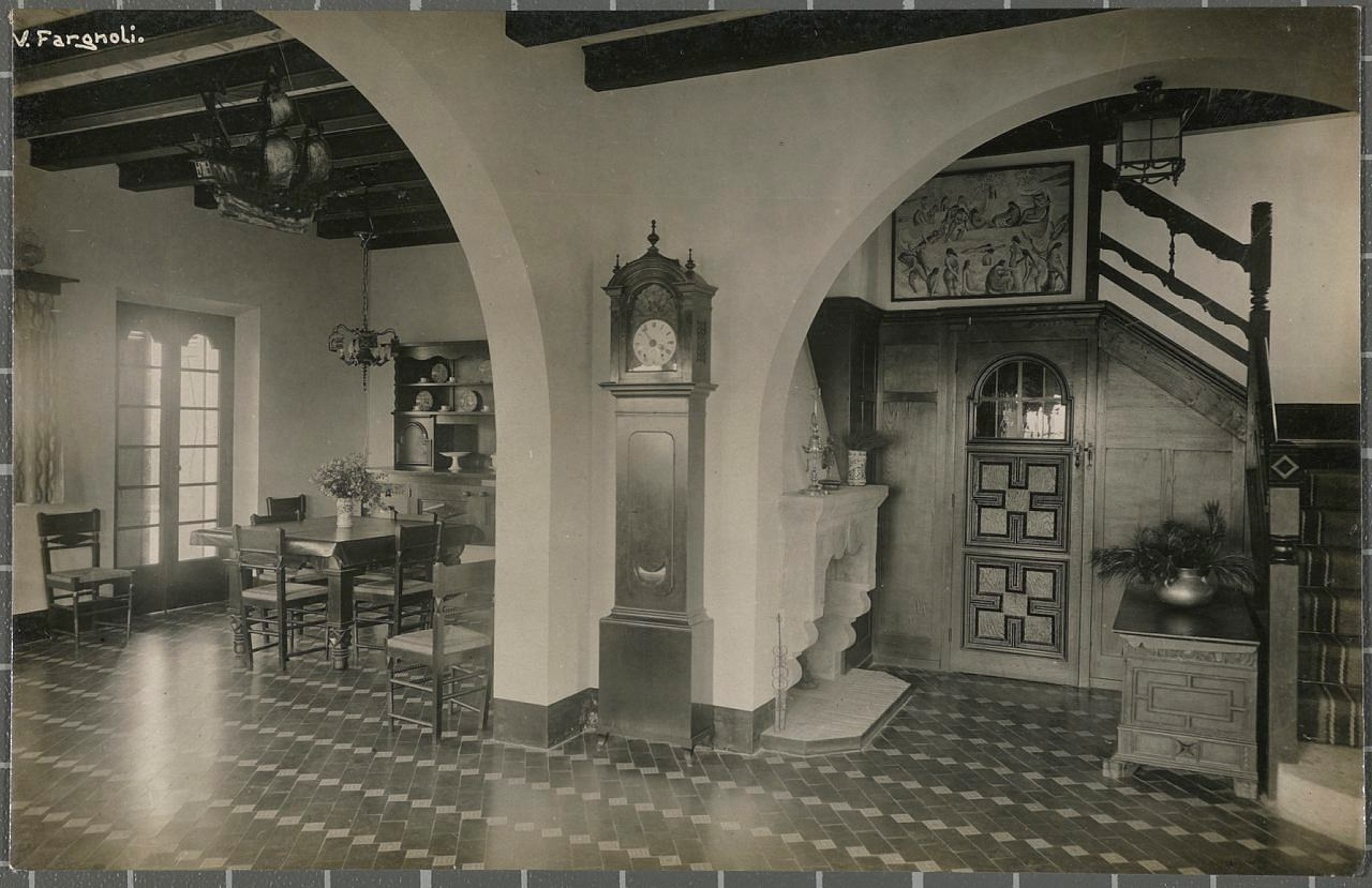 Interior del xalet de la Senya Blanca (S'Agaró) dissenyat per l'arquitecte Rafael Masó.